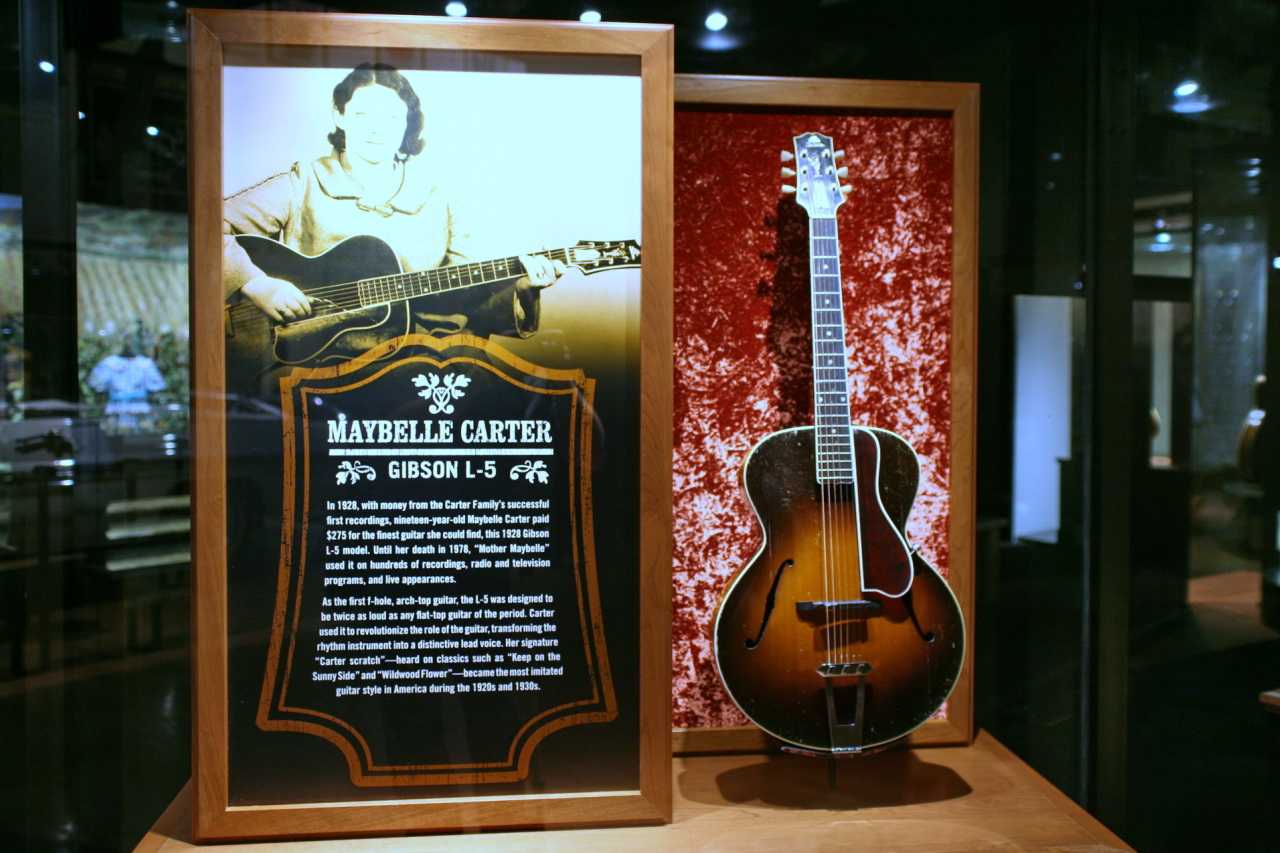 Gibson L-5 (1928), Maybelle Carter, CMHF